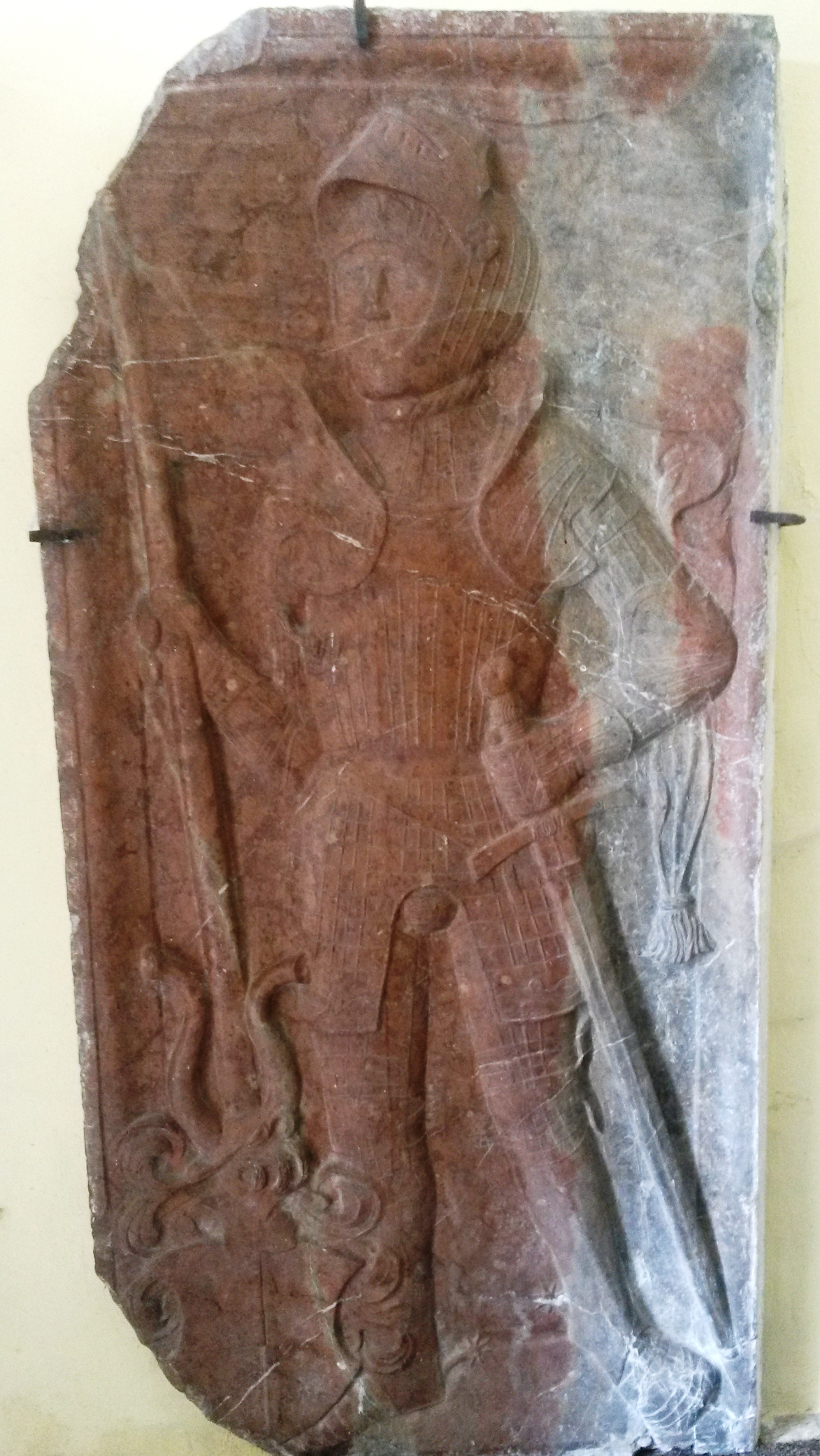 Marmorepitpaph eines Fünfkirchners (wahrscheinlich Hans von Fünfkirchen *1455, +1479) in der Pfarrkirche Poysbrunn